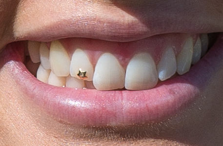 Tandsmyckning på idrottaren Erika Kinsey.